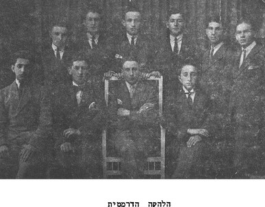 החוג לדרמה